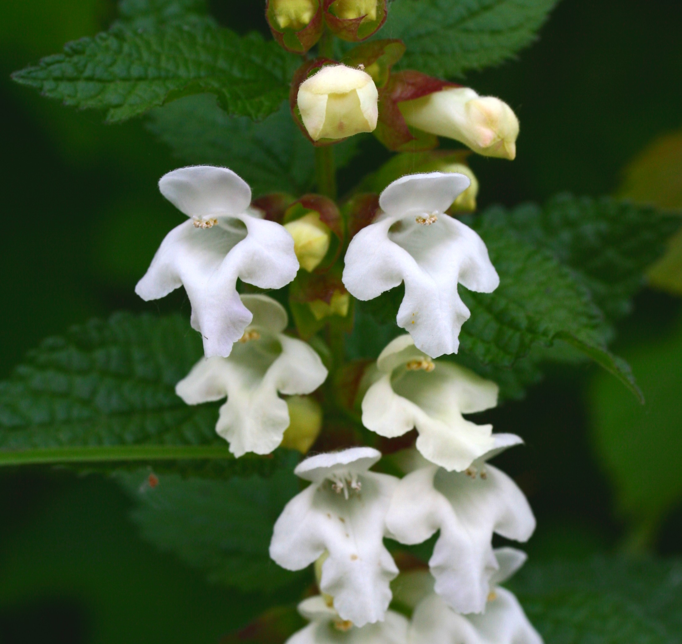 Erba limona comune - Località : Pellegai, Mel (BL), 503 m s.l.m.